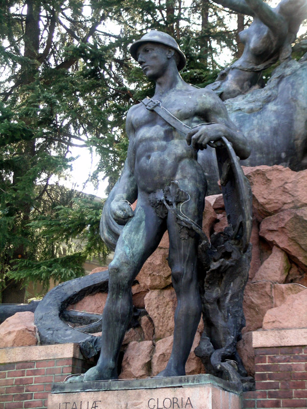 Varese, Monumento ai caduti, Enrico Butti, 1924